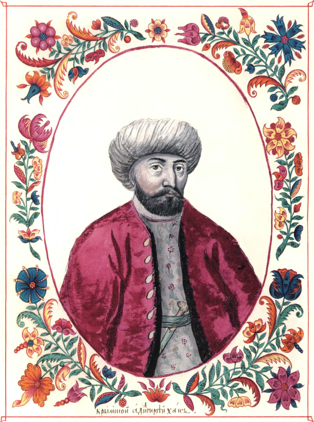 Адиль Гирей, хан Крымский